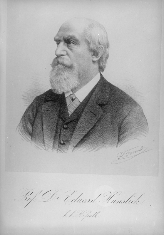 Eduard Hanslick (1825-1904)